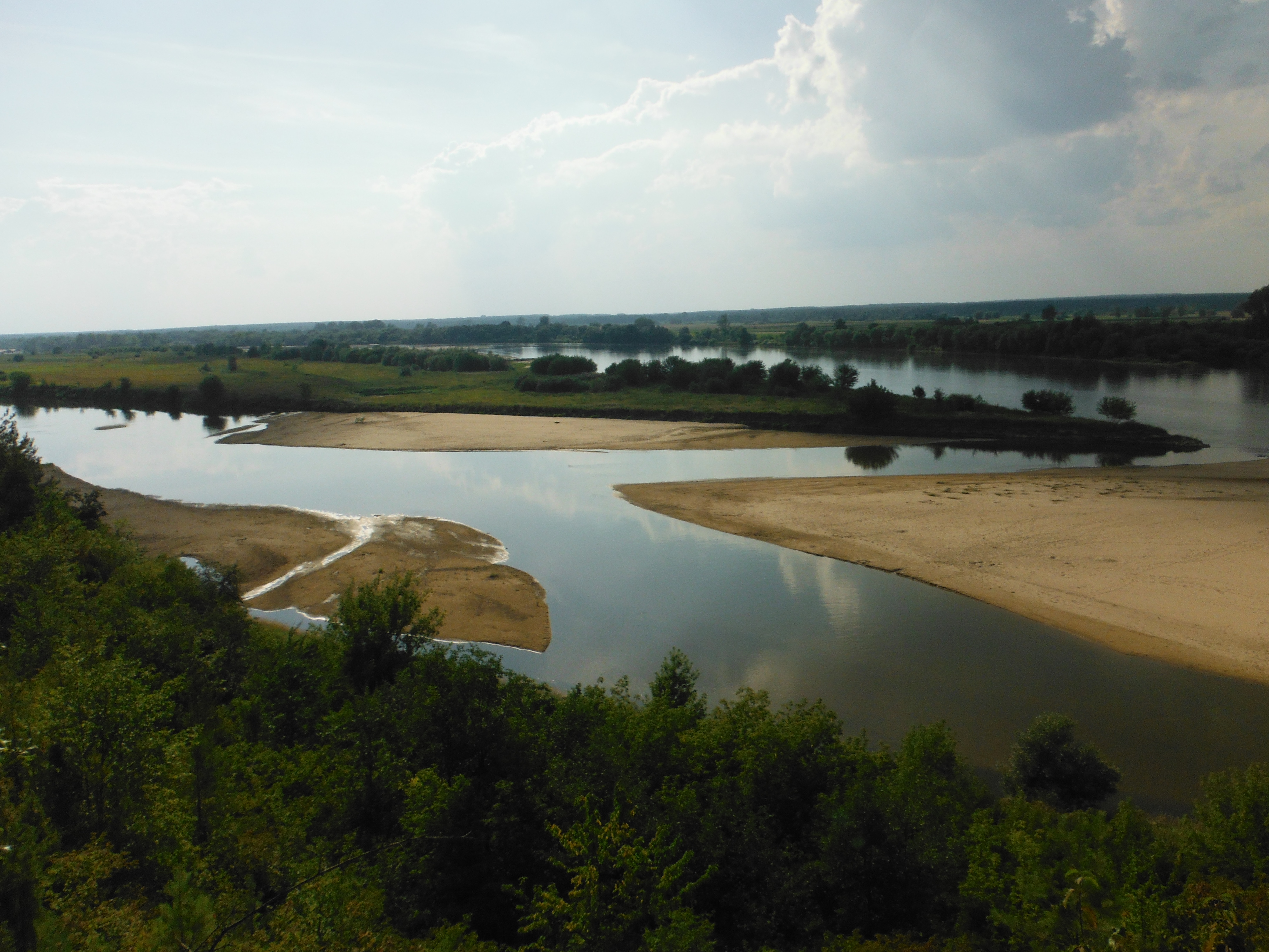 Rezerwat przyrody: Krowia Wyspa. This is a photography of protected area with CRFOP ID PL.ZIPOP.1393.RP.595